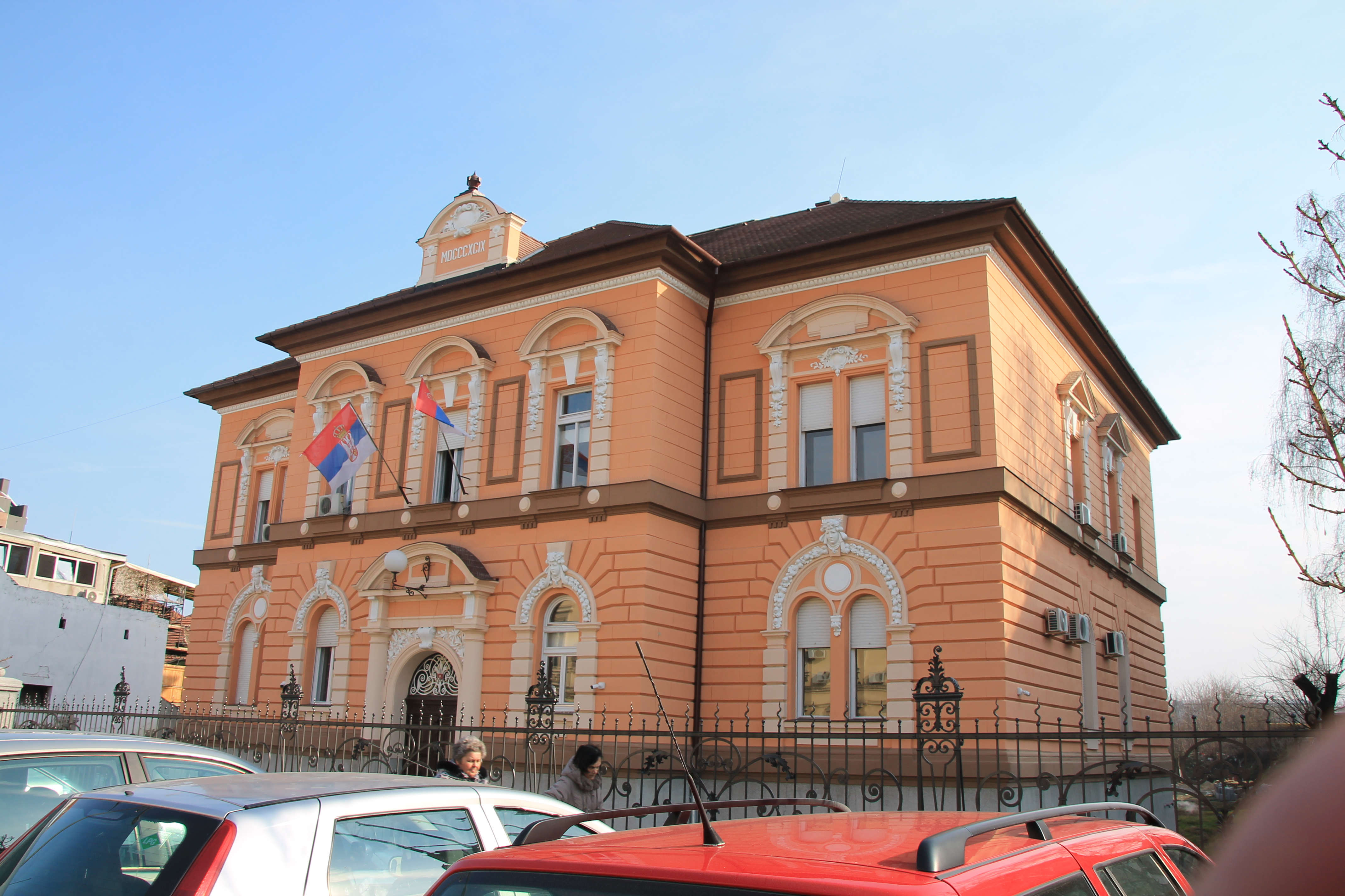 Staro jezgro Zrenjanina